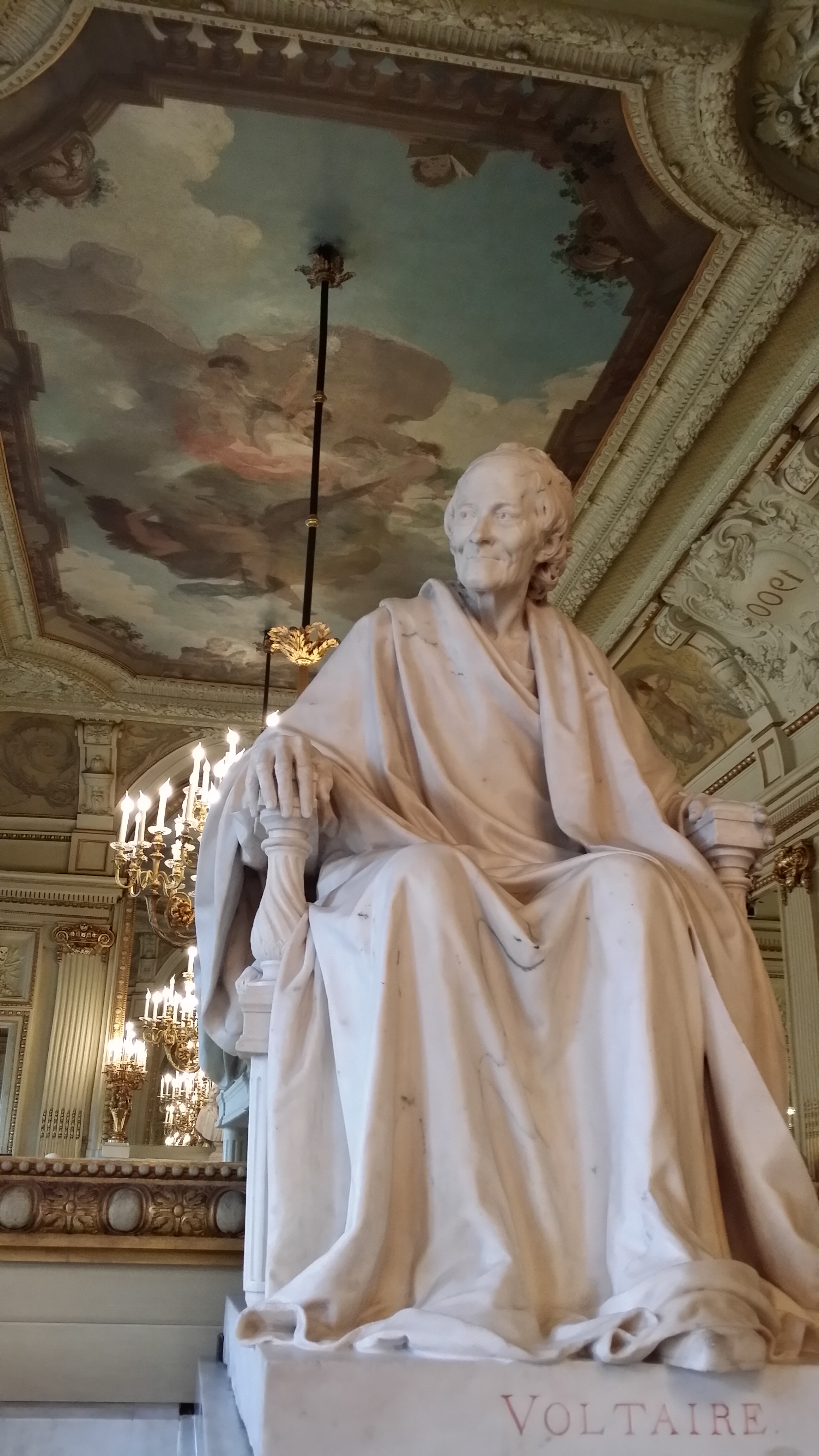 Voltaire sur cheminée d'un salon de la Comédie Française